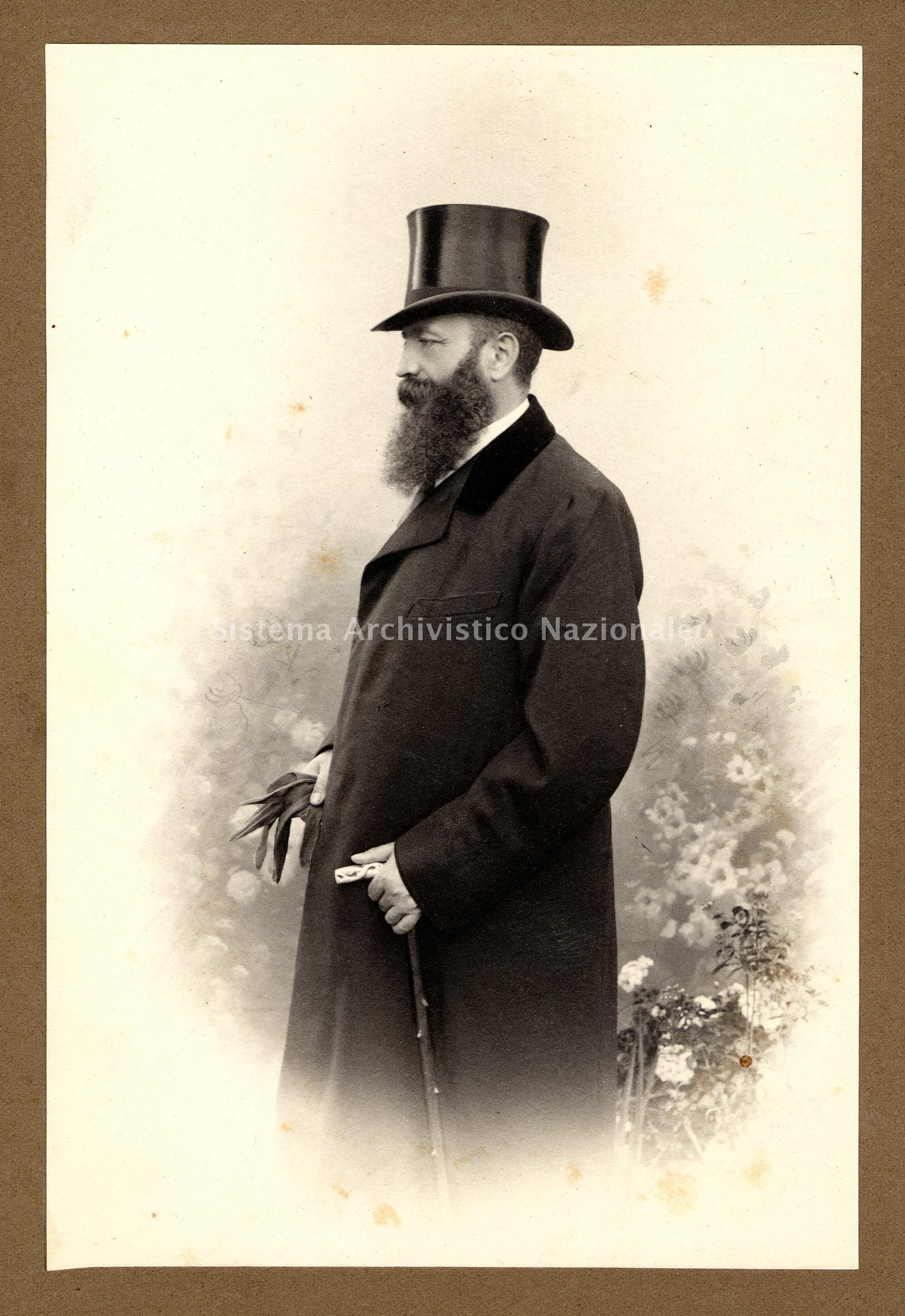 Ritratto di Ferdinando Maria Perrone, fine sec. XIX (Fondazione Ansaldo - Gruppo Finmeccanica)